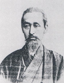 幸野楳嶺肖像写真